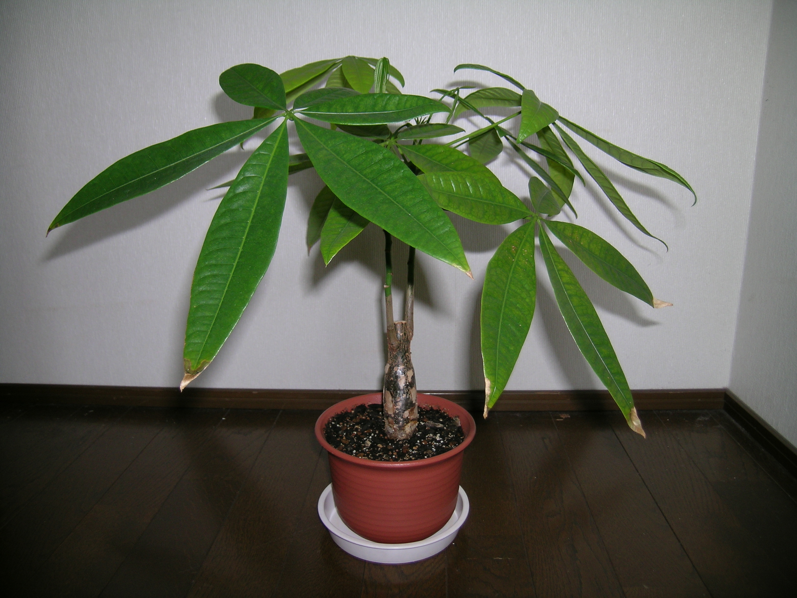 観葉植物パキラ